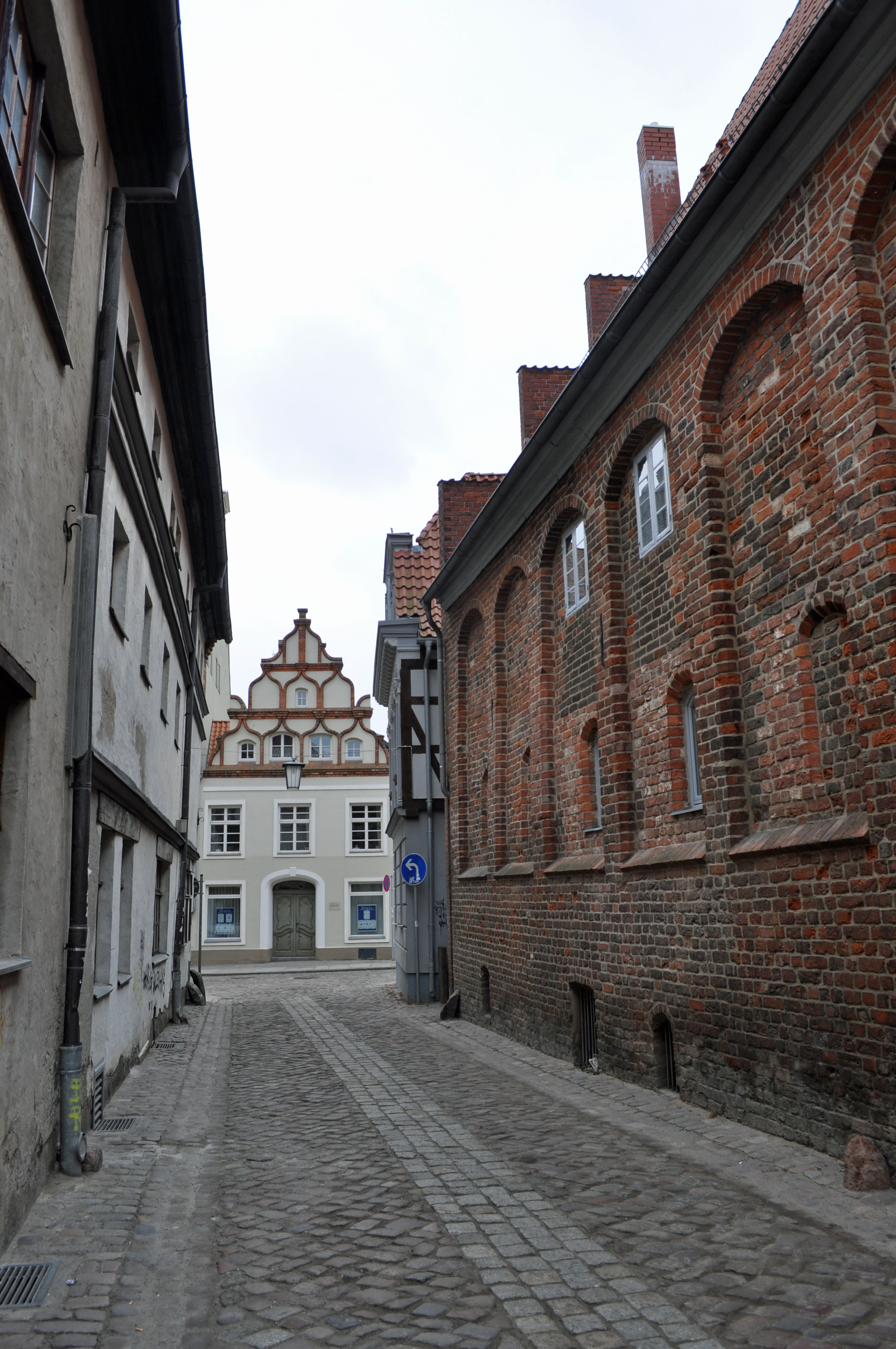 Gebäude bzw. Gebäudedetail in Stralsund. Straße und Hausnummer siehe Dateiname.